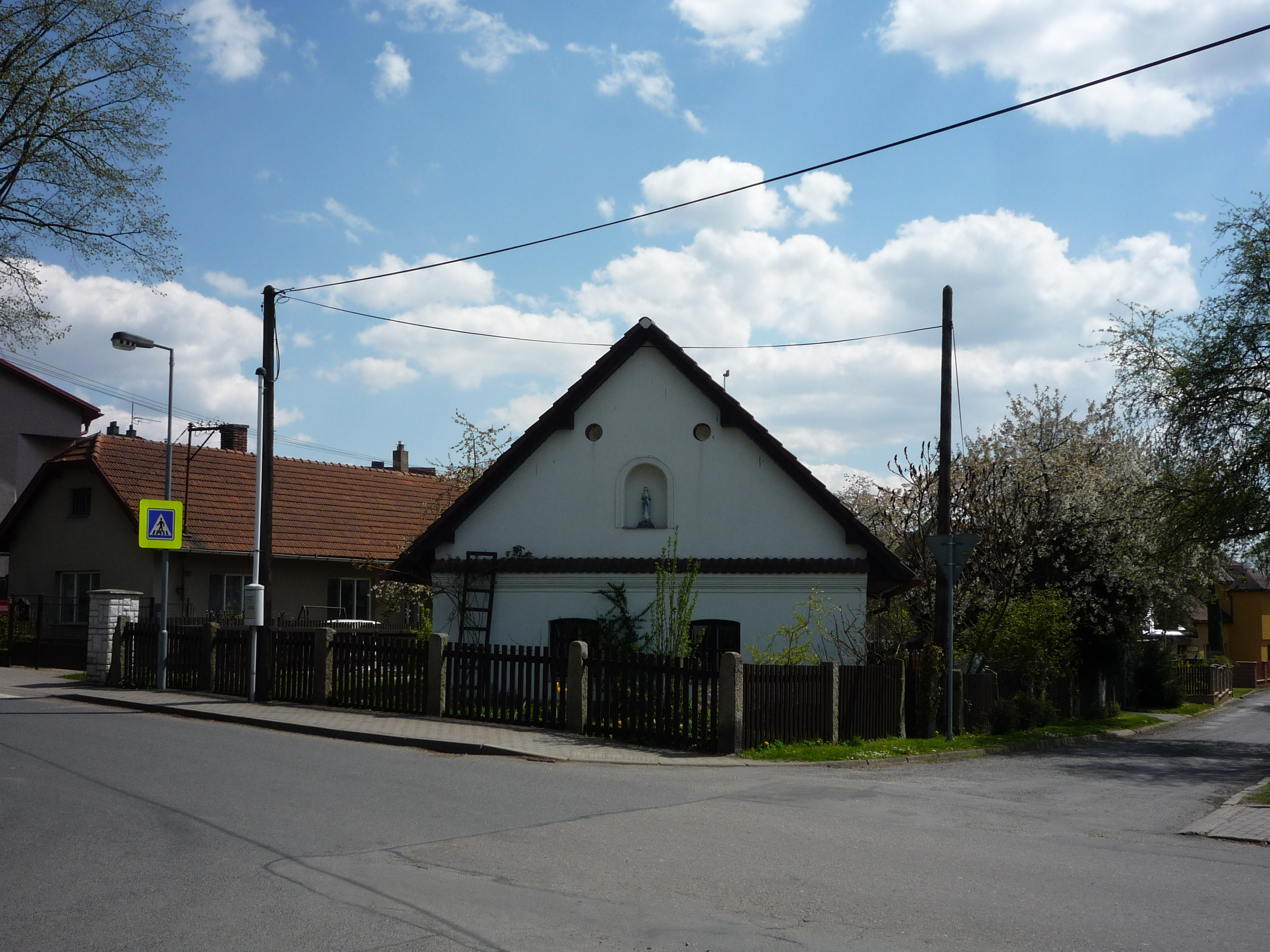 Autor fotografie Jiří Zelenka. Havlíčkův Brod. Městská část Perknov. Ulice Žďárská a Perknovská.